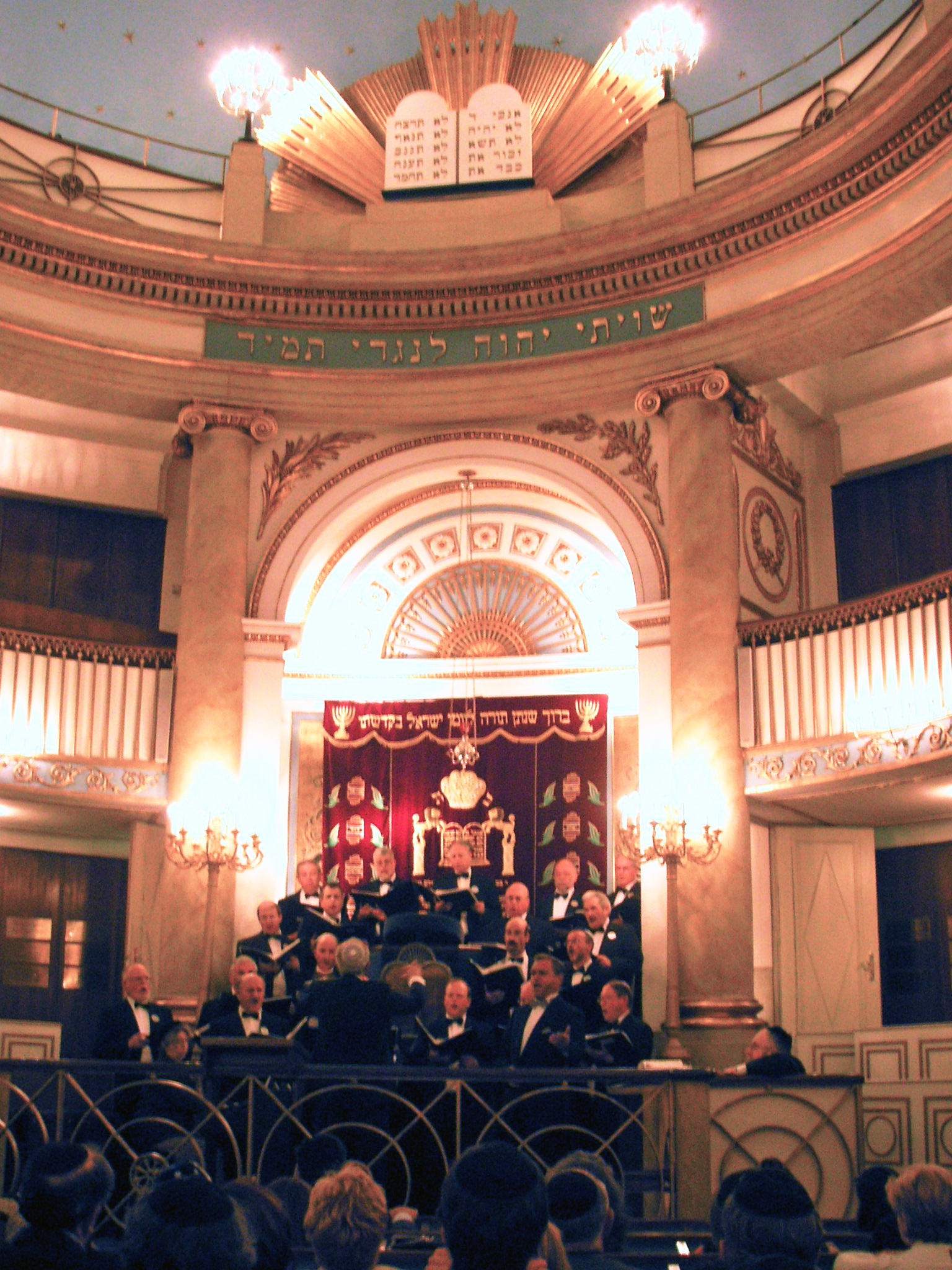 Kantorenkonzert in the Stadttempel in Vienna, with a visiting group from Jerusalem.